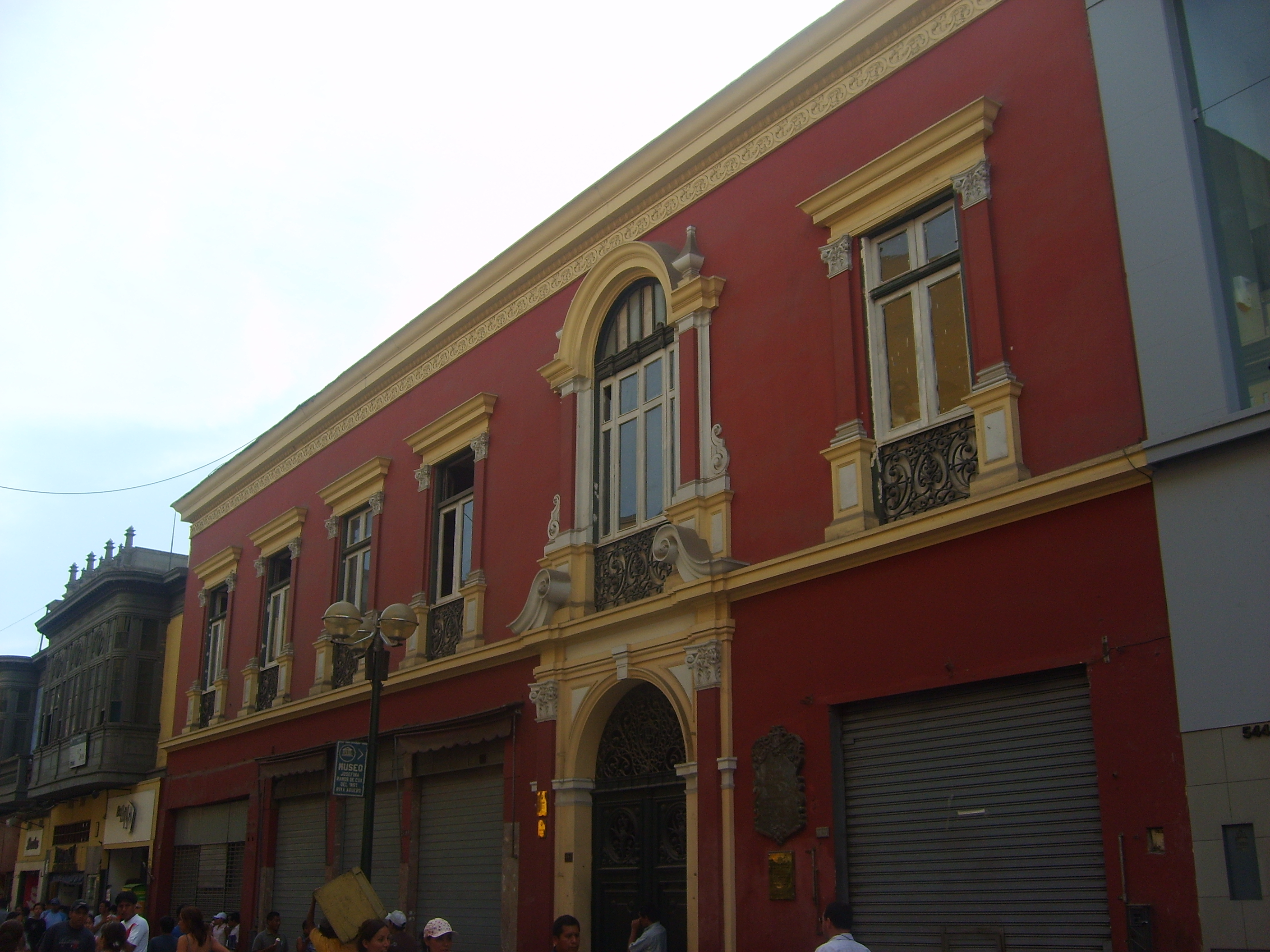 Casa donde vivió y murió el Libertador de Chile y Gran Mariscal del Perú Don Bernardo O'Higgins en la calle Jirón de la Unión a cuadras de la Plaza Mayor de Lima. Fotografía obtenida por el Usuario Valo en la ciudad de Lima, el 3 de marzo de 2007